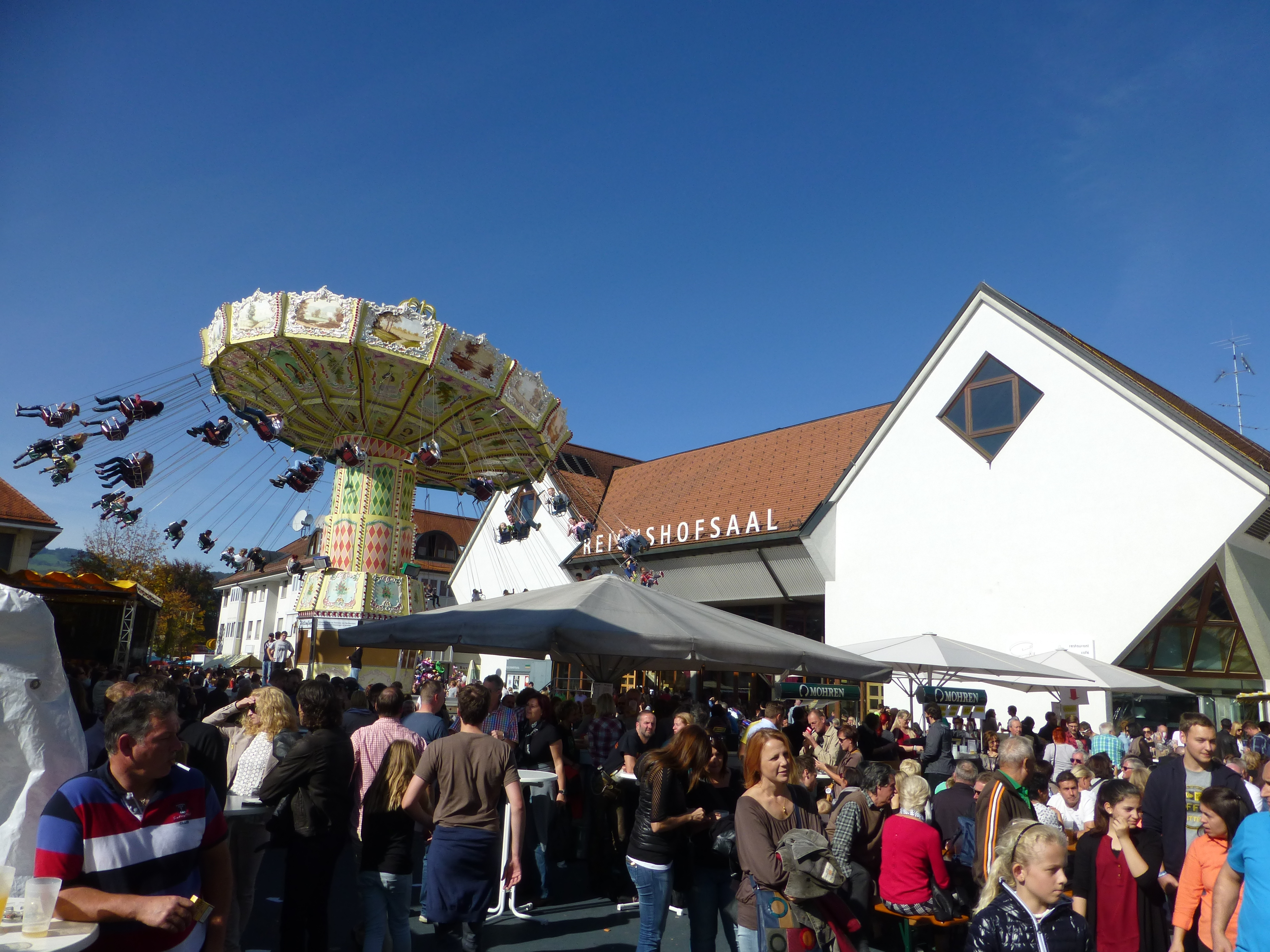 Die Lustenauer Kilbi, das größte Volksfest Vorarlbergs, im Jahr 2014